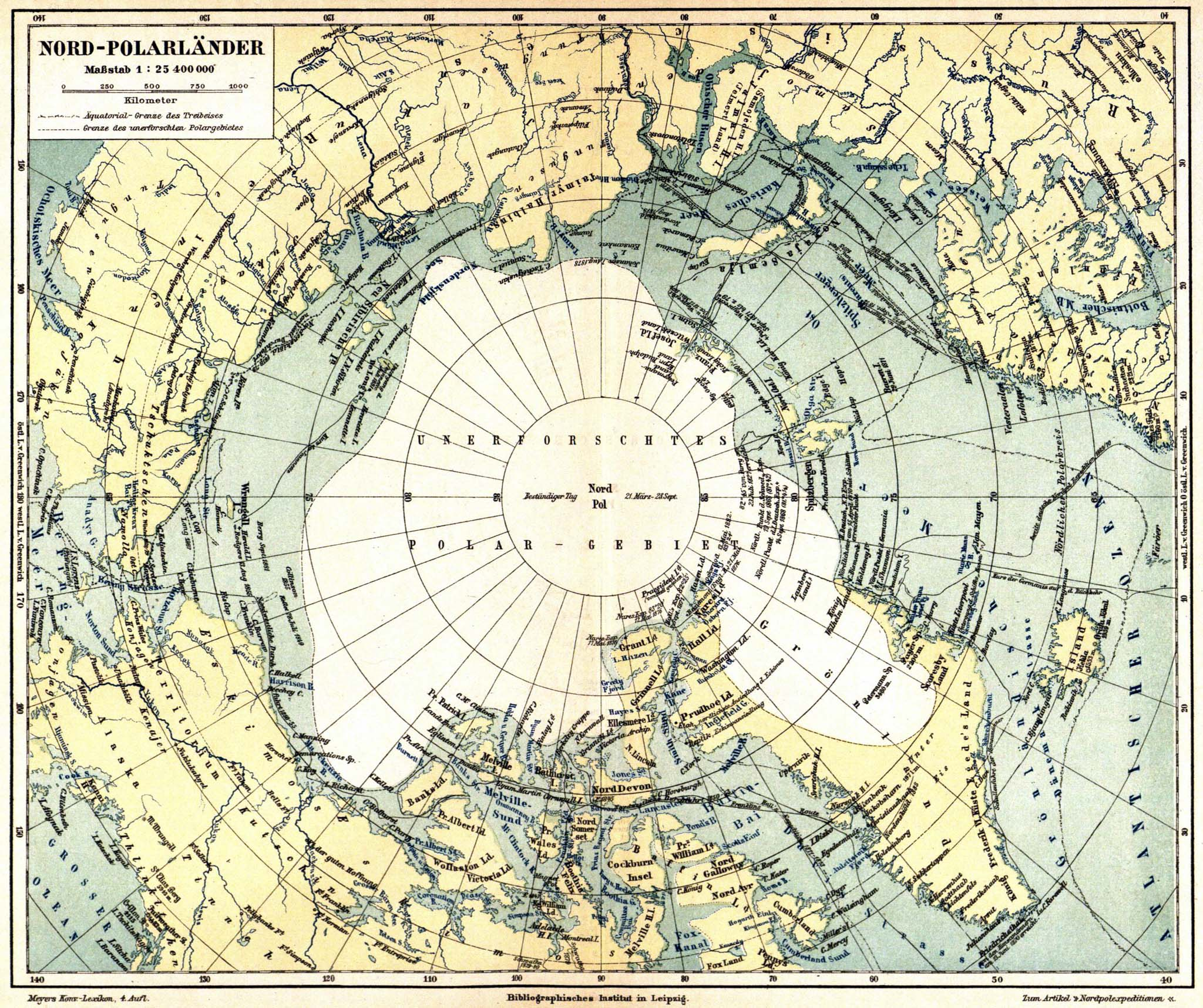 Karte „Nord-Polarländer“ (1 : 25 400 000) zum Artikel „Nordpolexpeditionen“; weiße Fläche rund um den Nordpol: „unerforschtes Polar-Gebiet“